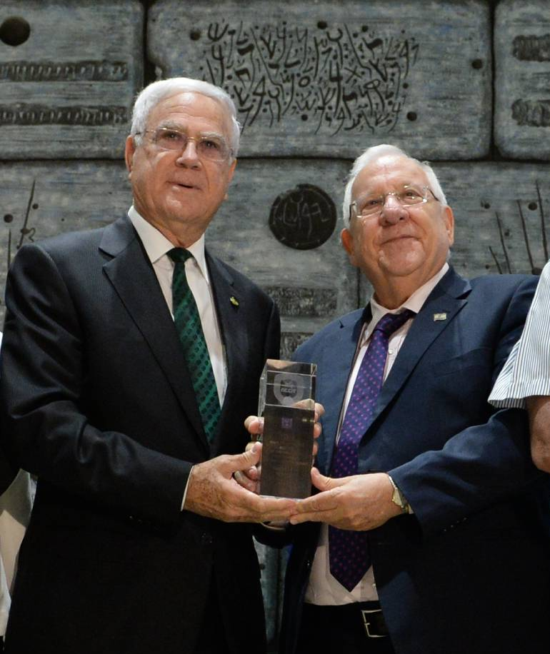 נשיא מדינת ישראל מעניק לקבוצת מכבי חיפה את מגן הכבוד, עם יו"ר מנהלת הליגות לכדורגל מר יורם באומן, יו"ר ועידת הפרס השופטת עדנה בקשטיין, בעל קבוצת מכבי חיפה יענקלה שחר, מנכ"ל משרד הספורט והתרבות מר יוסי שרעבי, מ"מ יו"ר התאחדות לכדורגל מר תמיר גילת, יו"ר הטוטו מר יוסי פילוס, וראש עיריית חיפה מר יונה יהב.